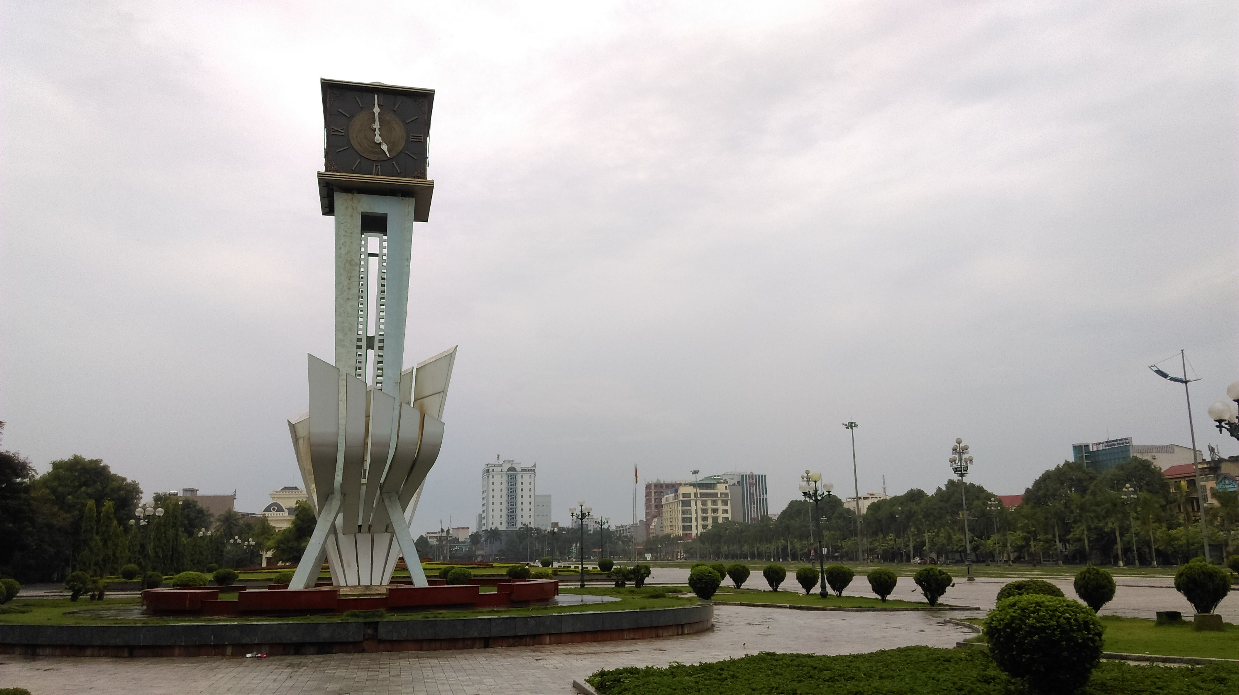 Quảng trường Lam Sơn, Thanh Hóa